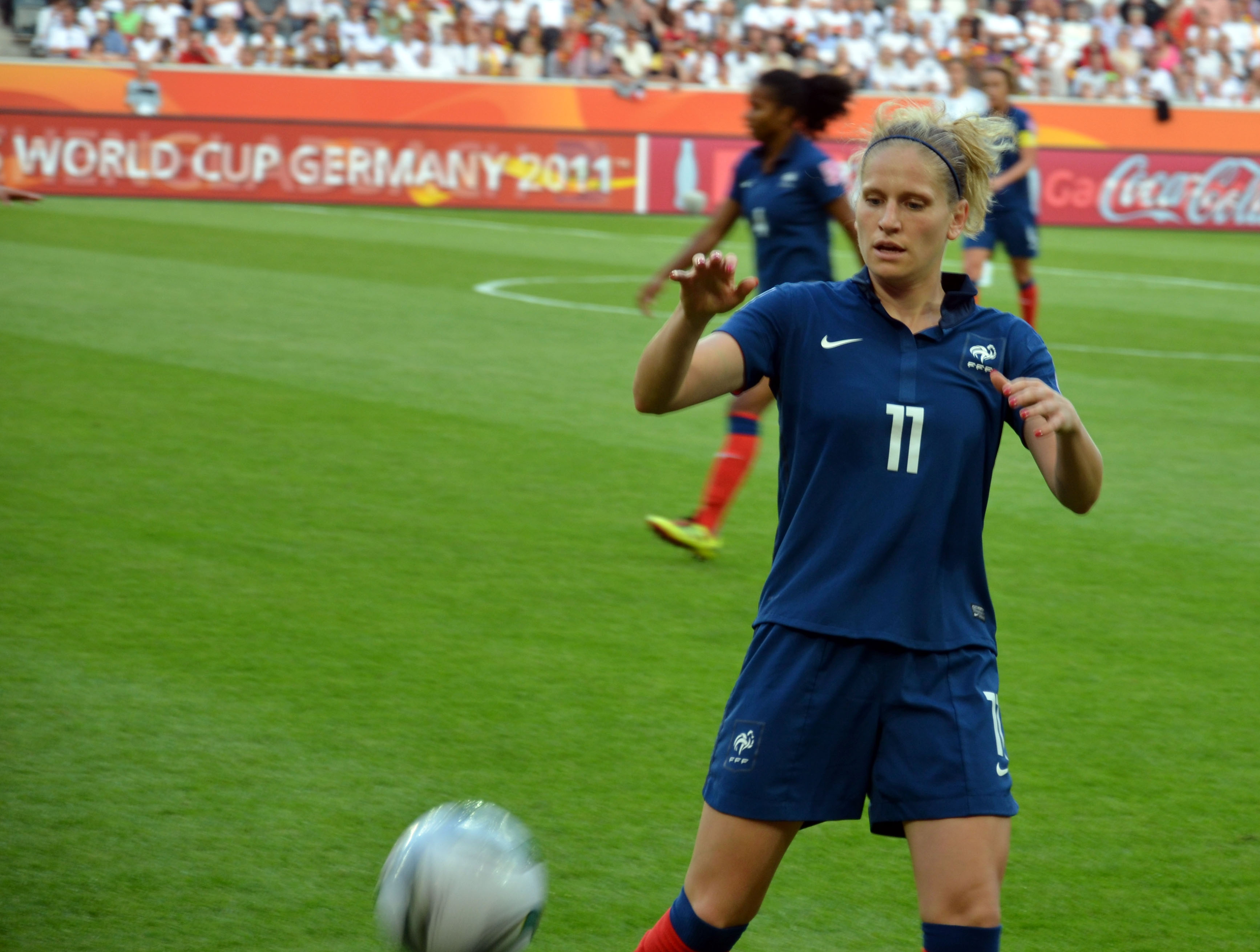 WM Vorrundenspiel zwischen Frankreich und Deutschland am 5. Juli 2011 im Borussiapark in Mönchengladbach Laure Lepailleur (11) wartet auf den Ball zum Einwurf